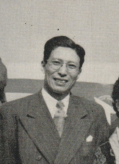 株式会社繭山龍泉堂社長のちに会長、東京美術倶楽部取締役、東京美術商協同組合理事長、相談役を歴任。享年85歳。